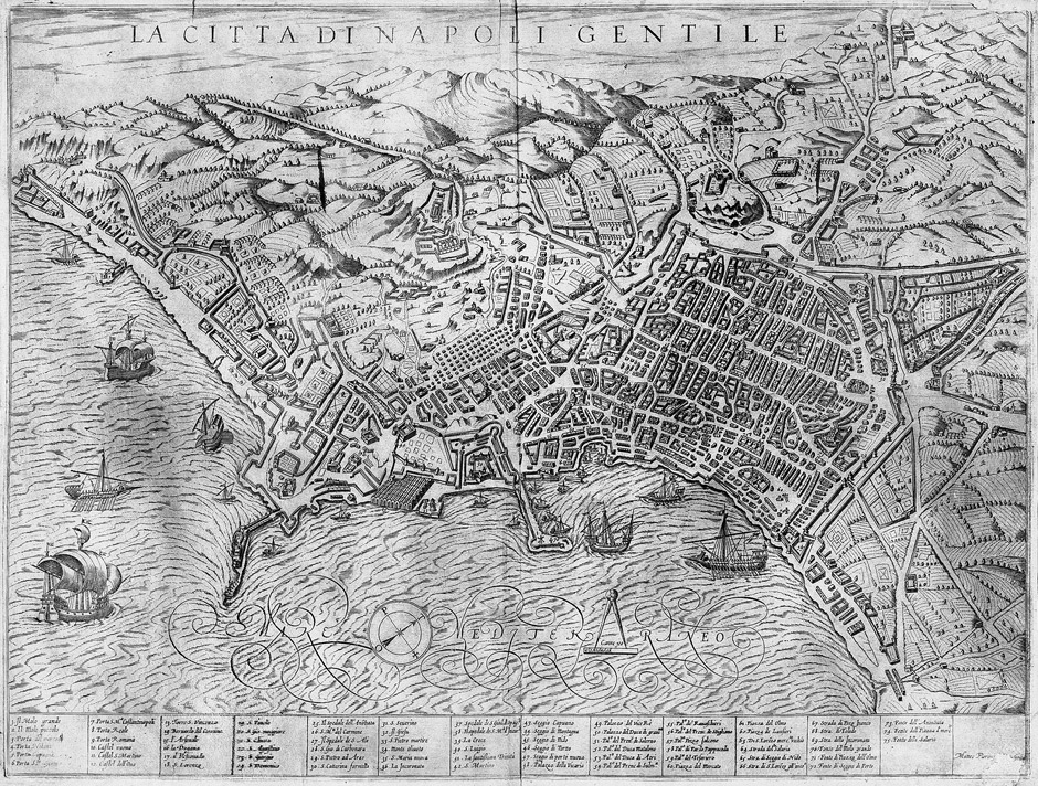 La Citta di Napoli Gentile. Kupferstich aus der Vogelschau, 39,8 x 52,5 cm. Siena. Um 1590.